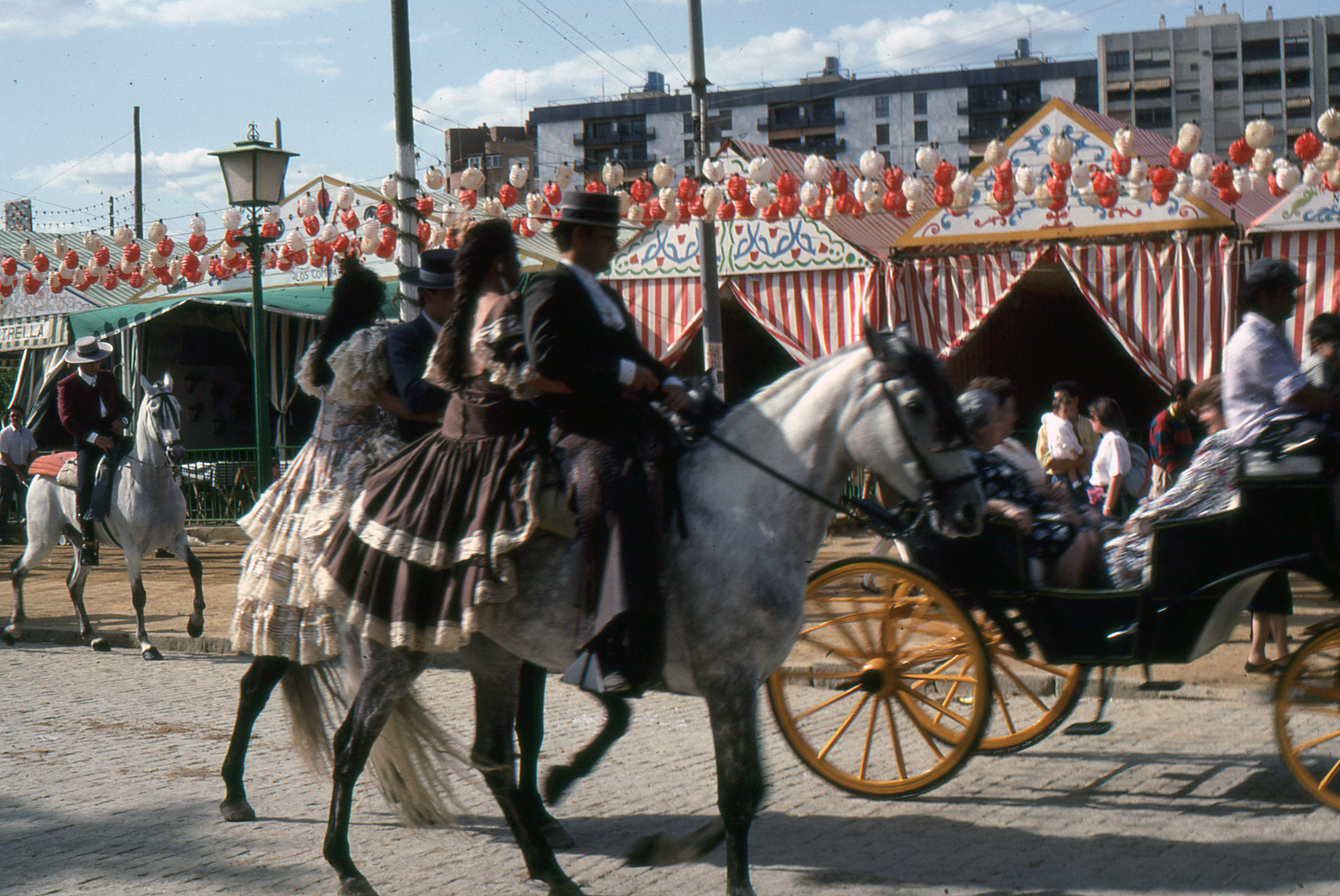 Doce cascabeles lleva mi caballo por la carretera y un par de claveles al pelo prendío lleva mi romera..